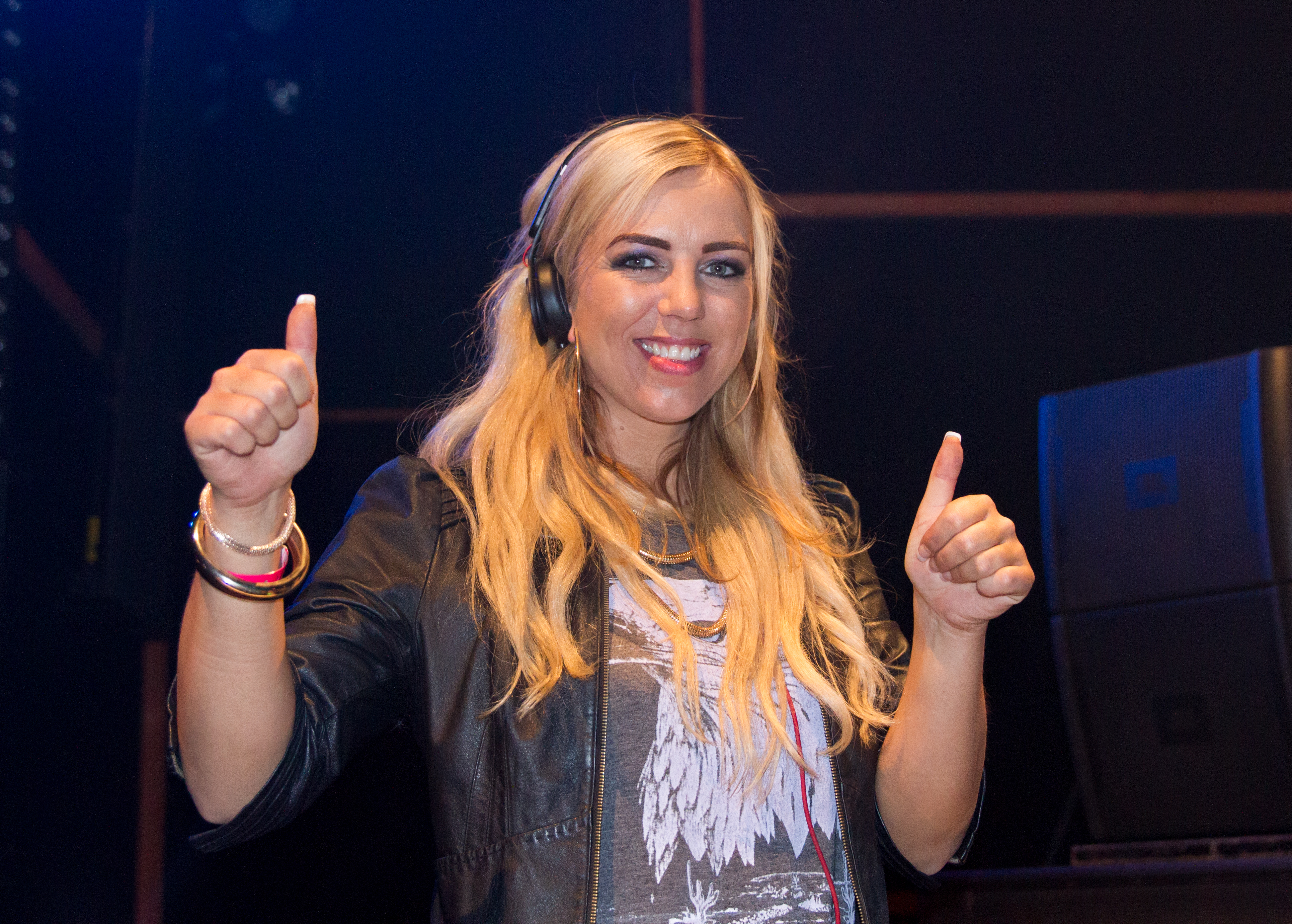 Korsakoff (Lindsay van der Eng) beim 14. Airbeat-One Dance Festivals das vom 16. bis 19. Juli 2015 auf dem Flugplatz Neustadt-Glewe.